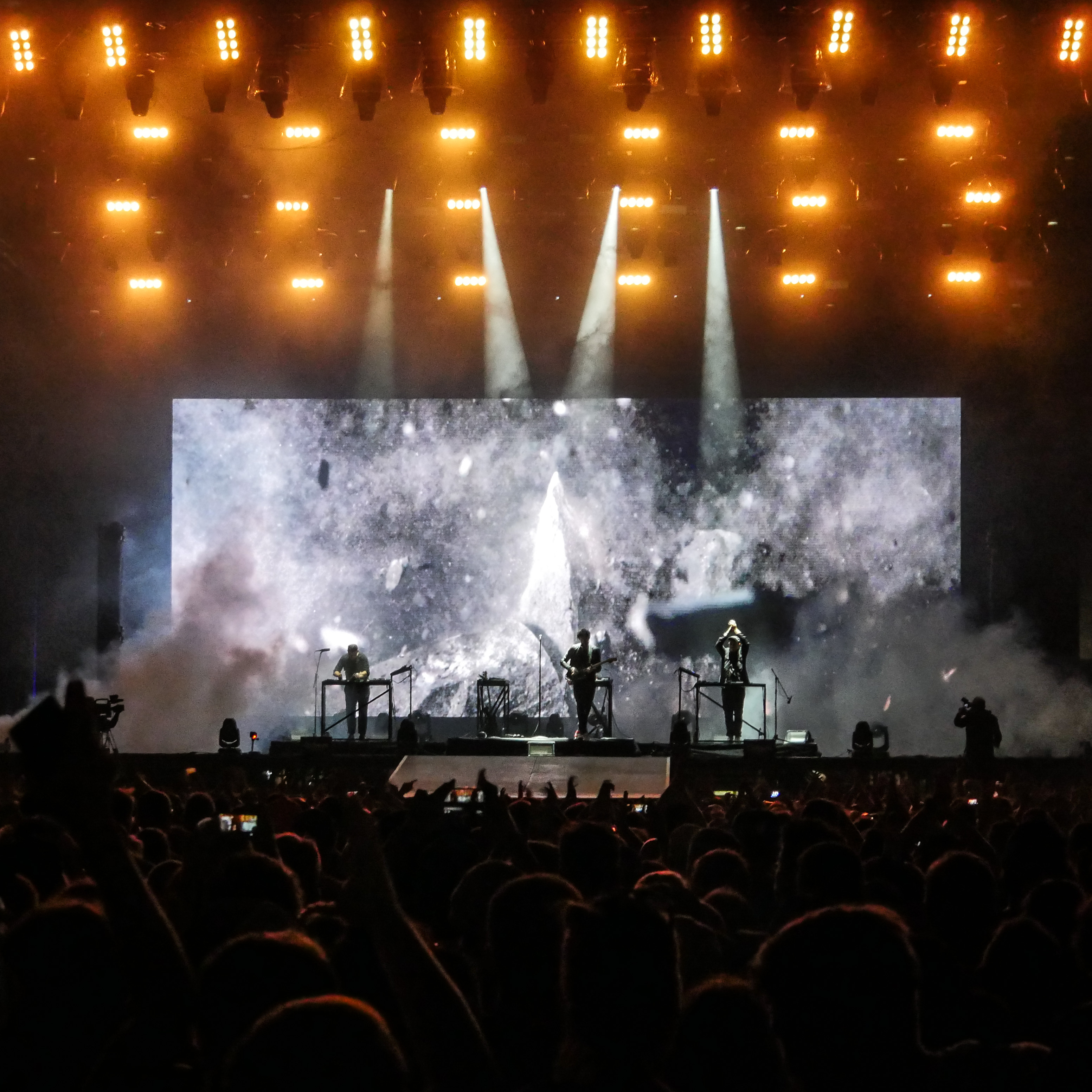 Moderat beim Festival "Colours of Ostrava" 2017